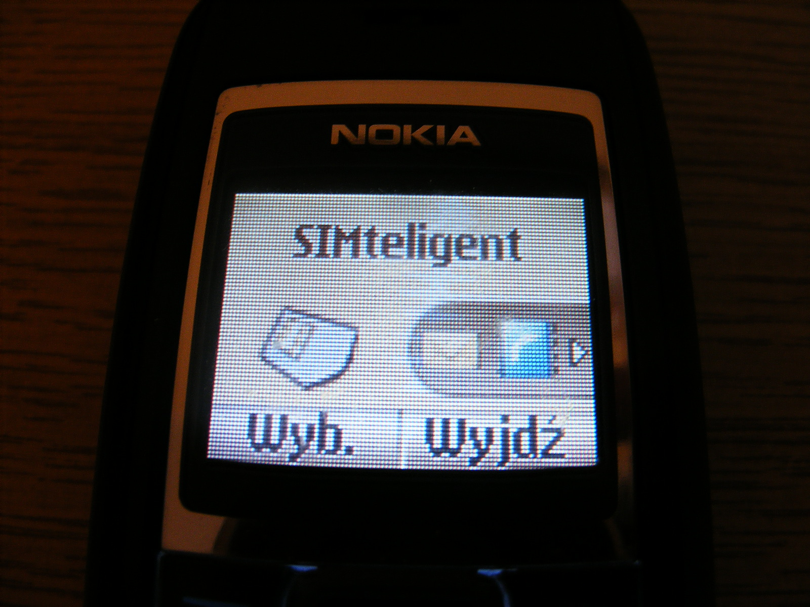 Simteligent w menu nokii 1600.